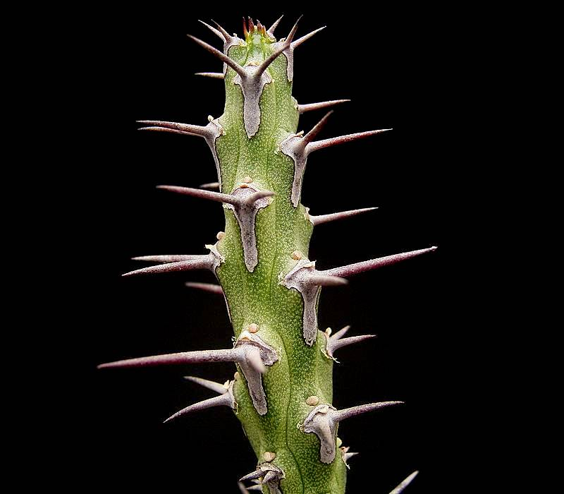 Euphorbia galgalana